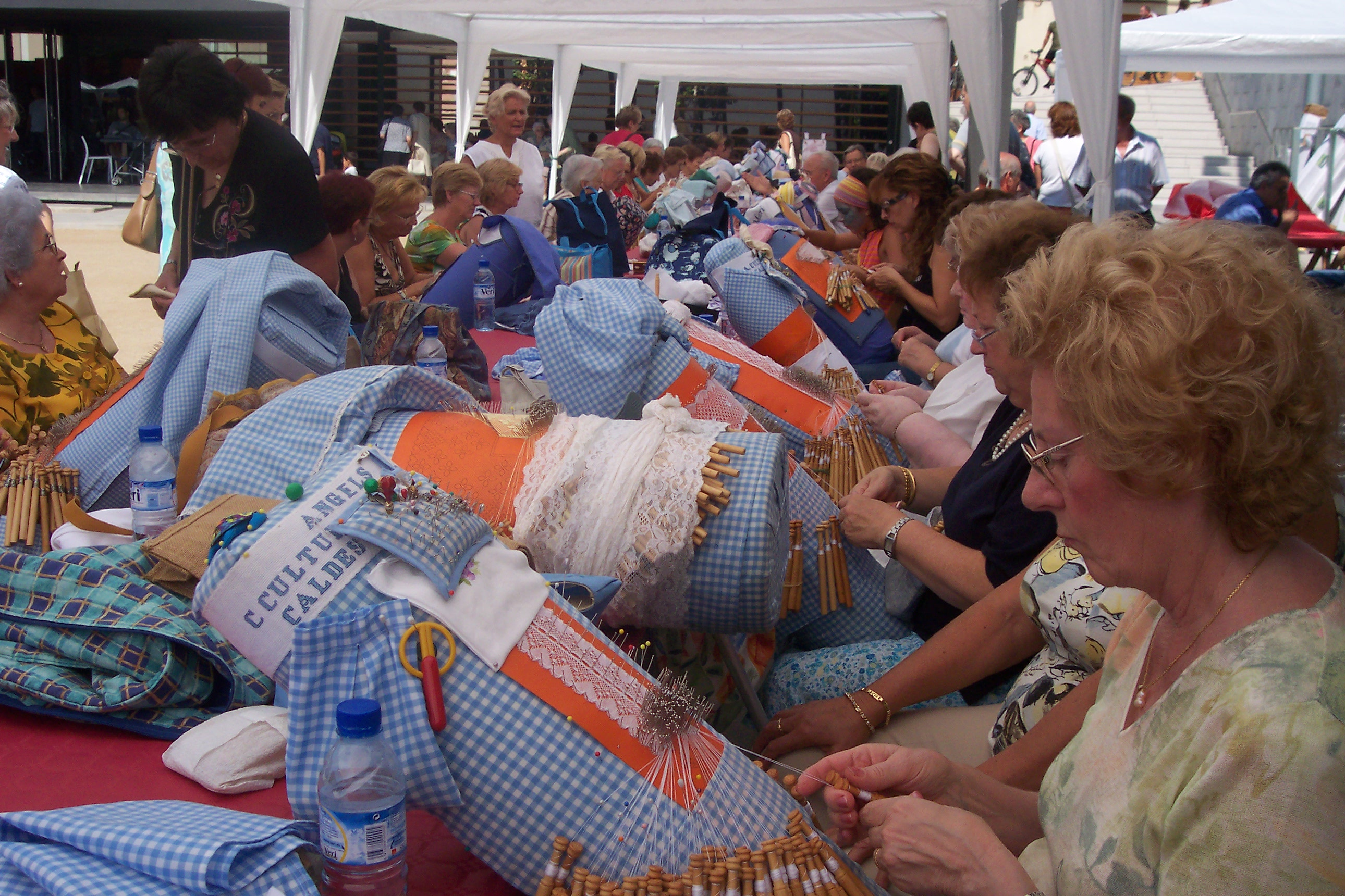 2006 Trobada de Puntaires in Castellar del Vallès (Barcelona, Catalunya, Spain) Boixets olive 2007-2-25 esteve olive public domain